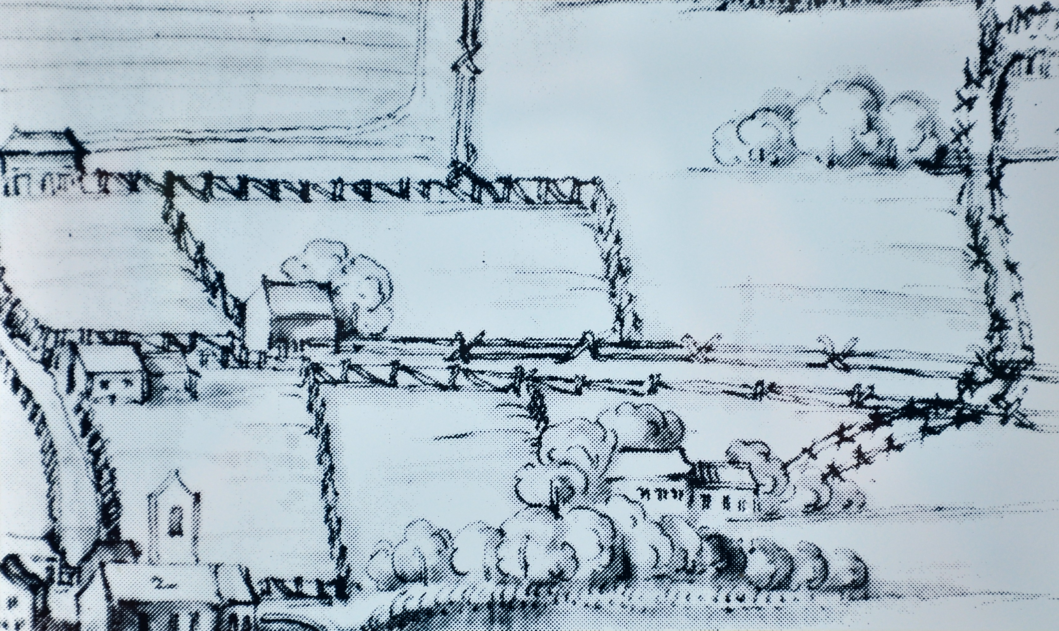 Busskirch auf dem Allmeind-Plan